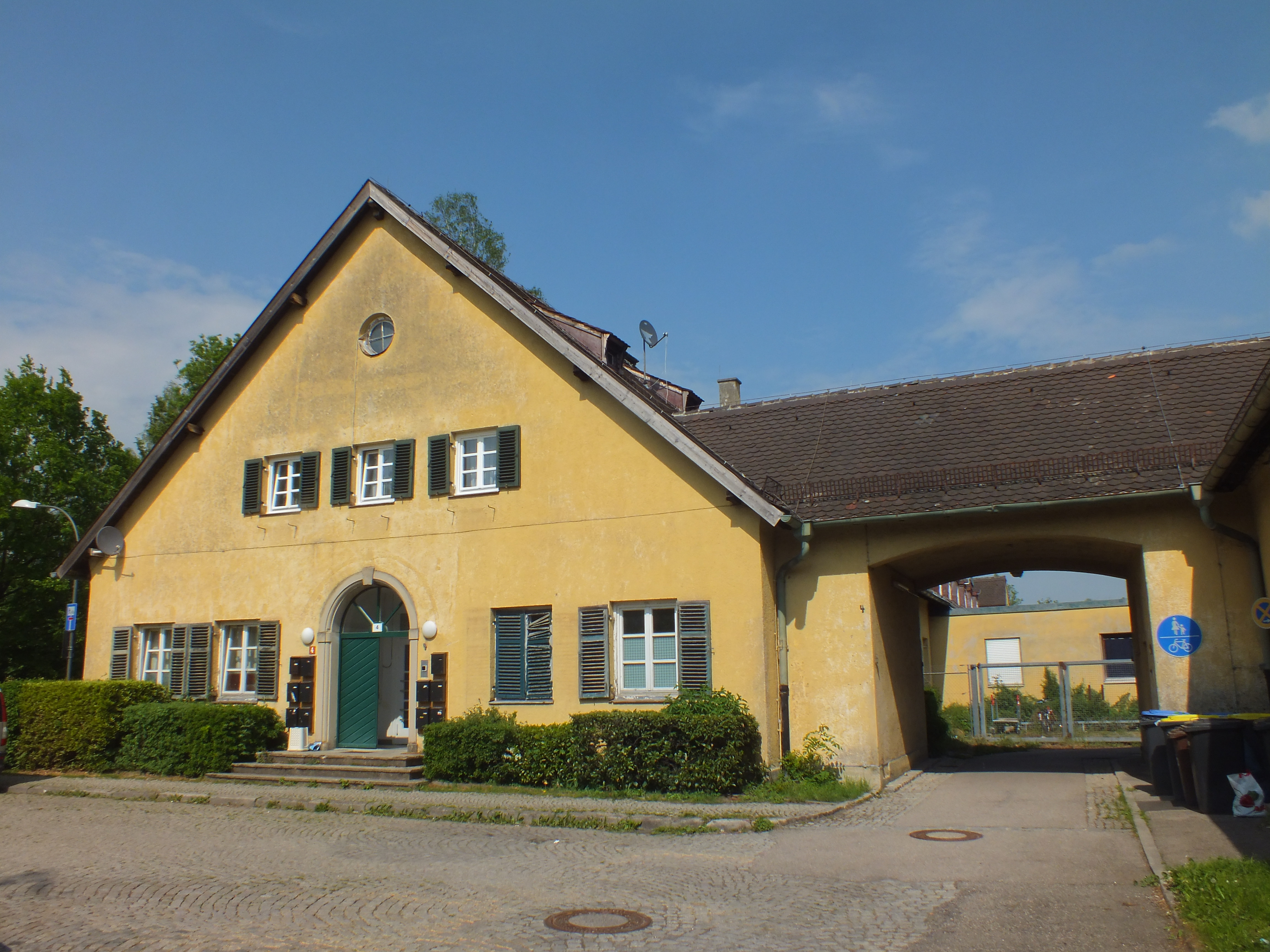 Dachau: Am Kräutergarten 4, mit Durchgang zum Durchgang zu den Gewächshausern